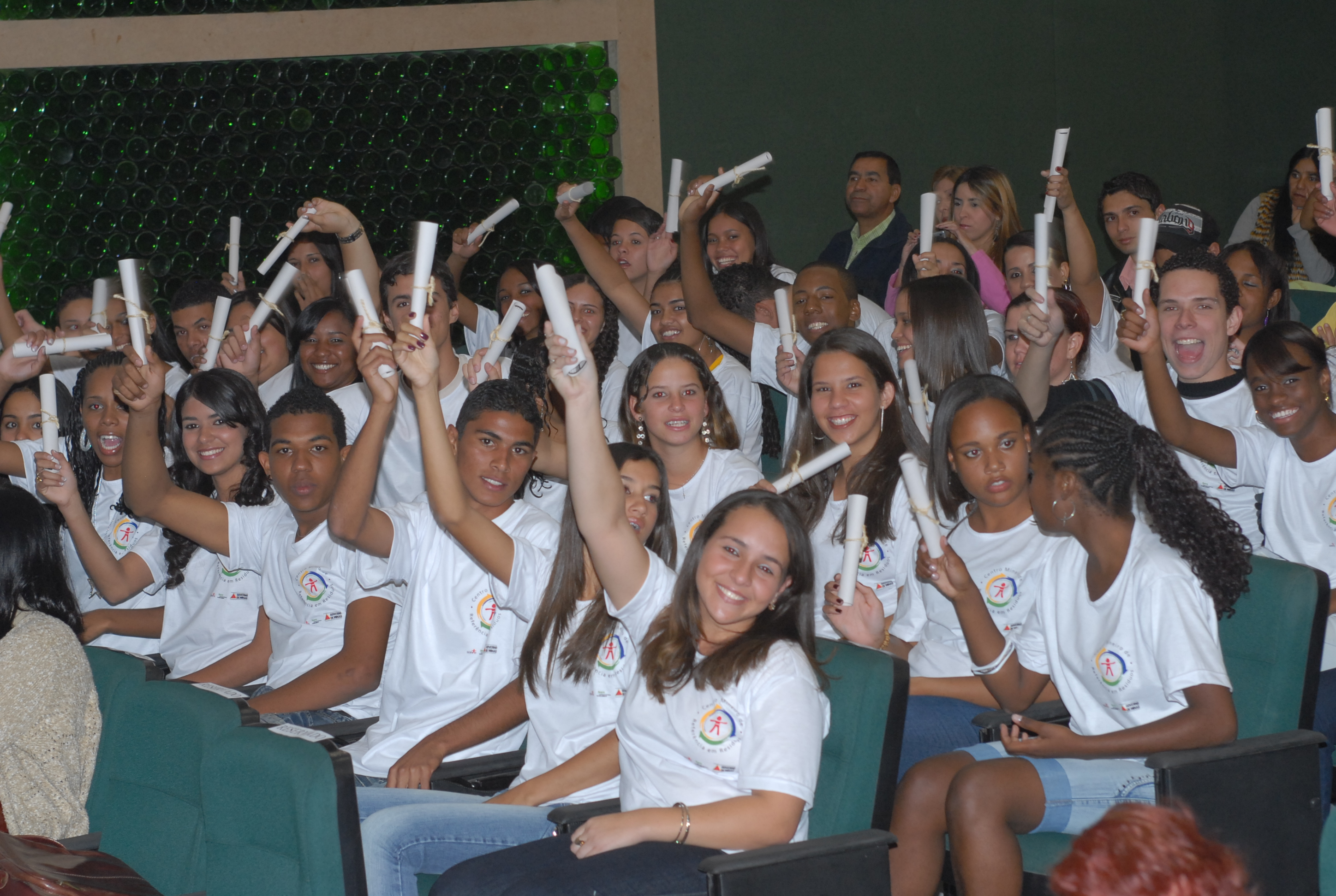 Estudantes de escolas públicas de Belo Horizonte comemoram a conclusão do Curso de Reciclagem do Centro Mineiro de Referência em Resíduos